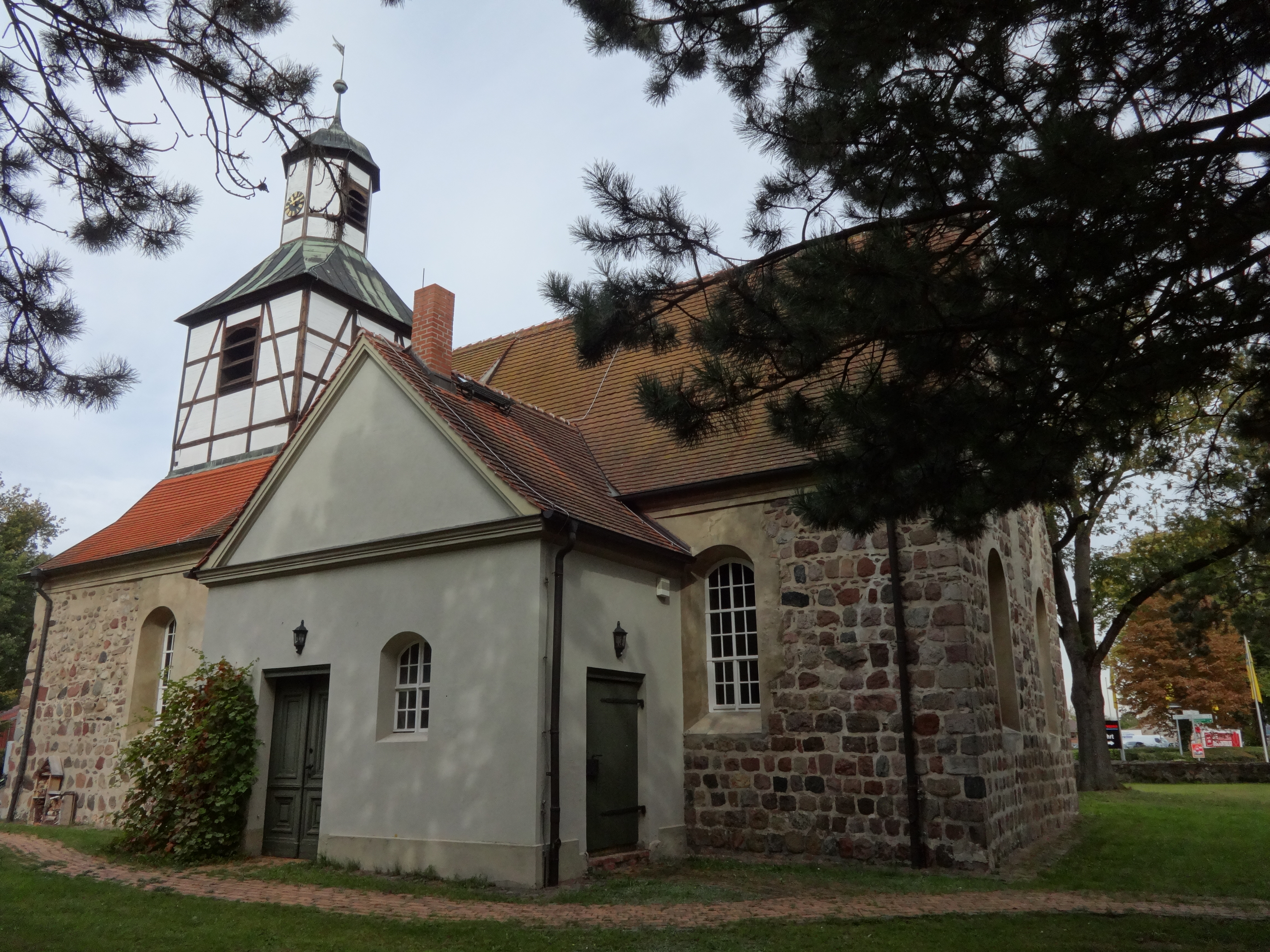 Die Dorfkirche in Blankenfelde der Gemeinde Blankenfelde-Mahlow im Landkreis Teltow-Fläming entstand aus Feldsteinen in der zweiten Hälfte des 13. Jahrhunderts. Die ursprünglich reichhaltige Ausstattung wurde bei einem Brand 1740 fast vollständig zerstört.